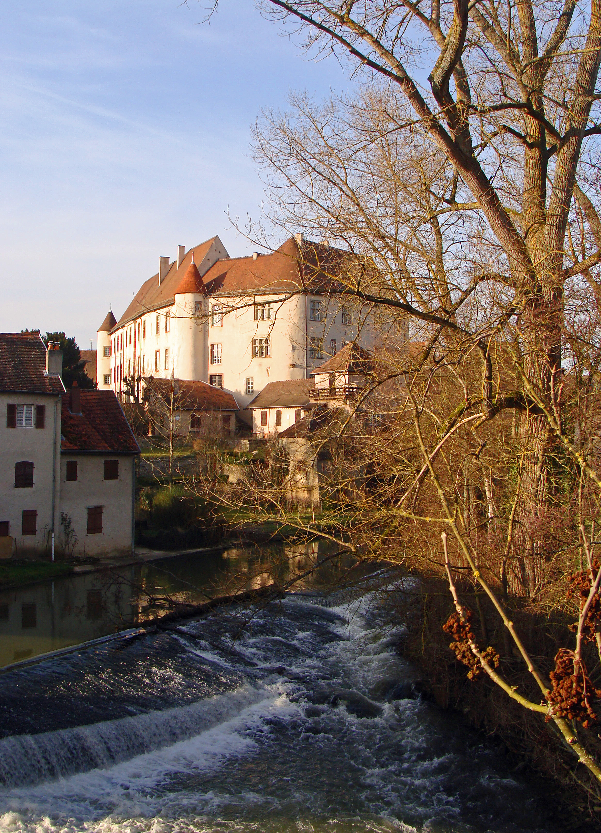 Le château de Fénétrange (Moselle) sur les bords de la Sarre. Photo prise le 30 janvier 2014.